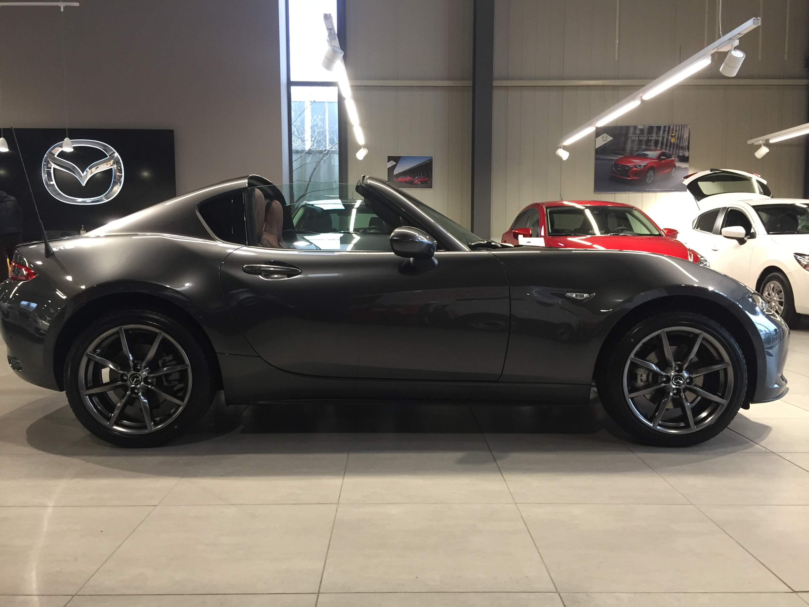 Mazda MX 5 RF (Targa) Seitenansicht